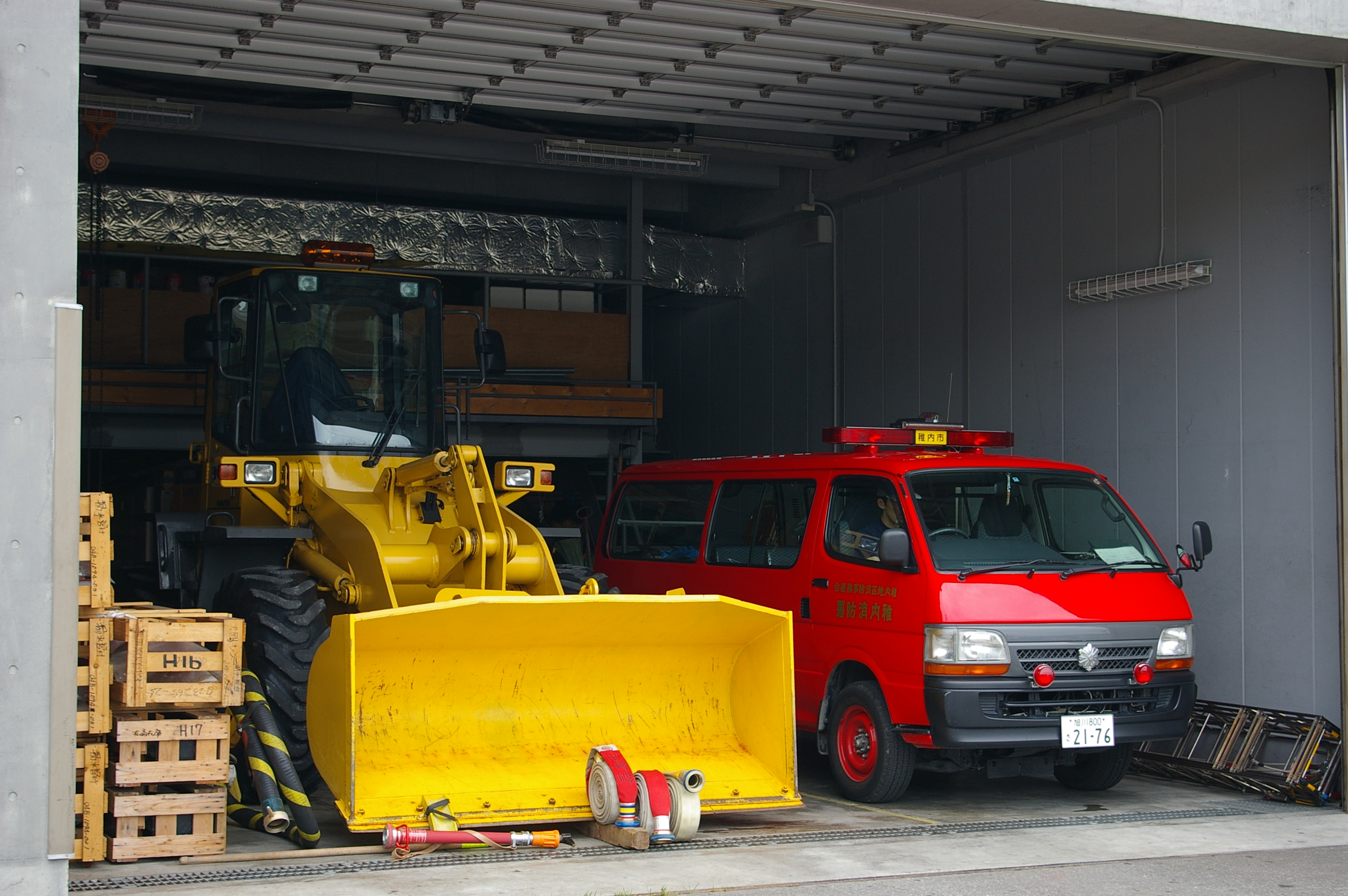 Wheel loder & TOYOTA Hi-ace.